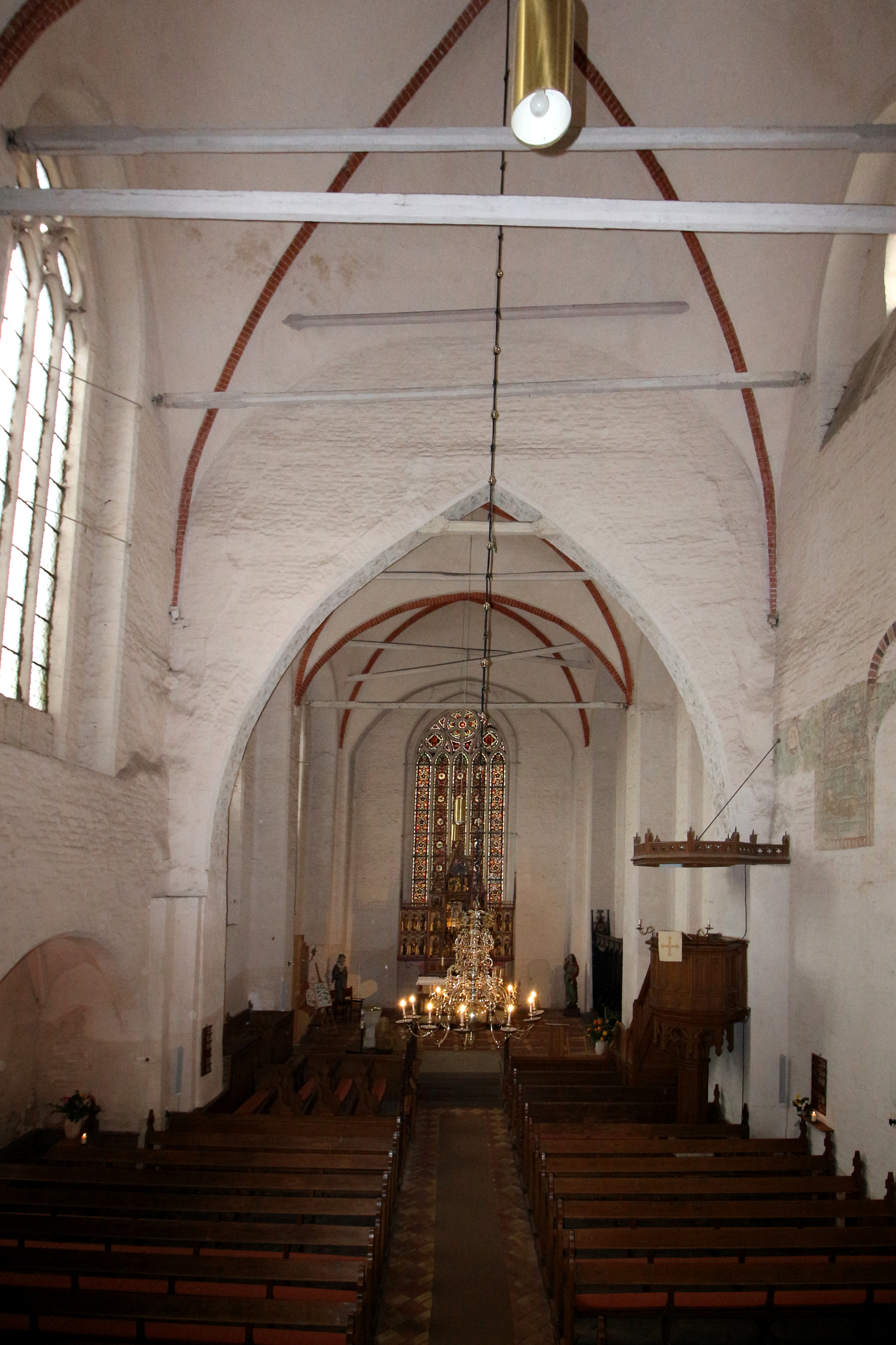 Rehna Klosterkirche innen